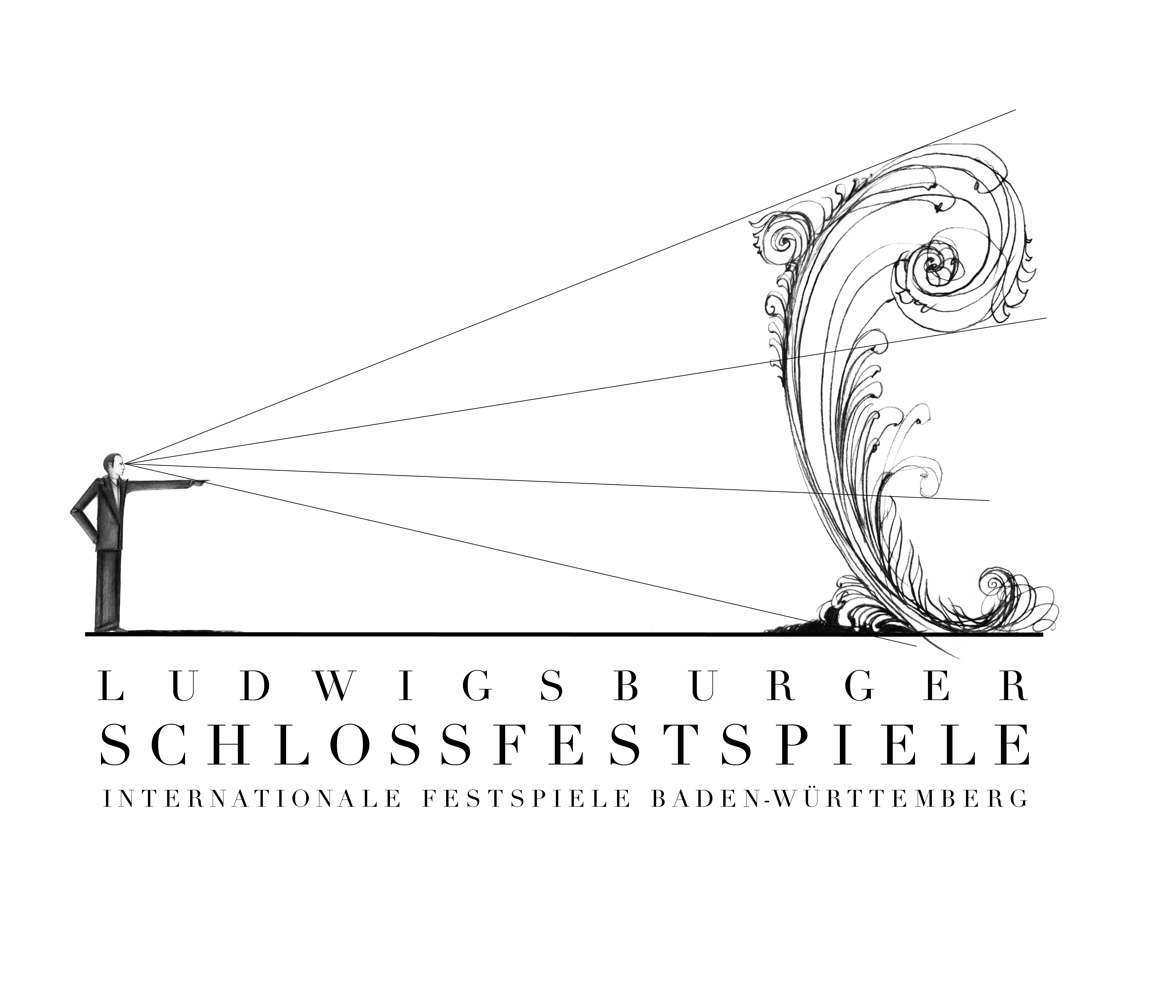 Logo der Ludwigsburger Schlossfestspiele